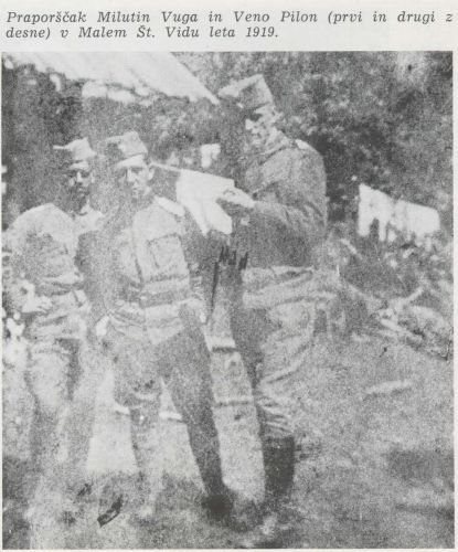 Praporščak Milutin Vuga in Veno Pilon (prvi in drugi z desne) v Malem Št. Vidu leta 1919